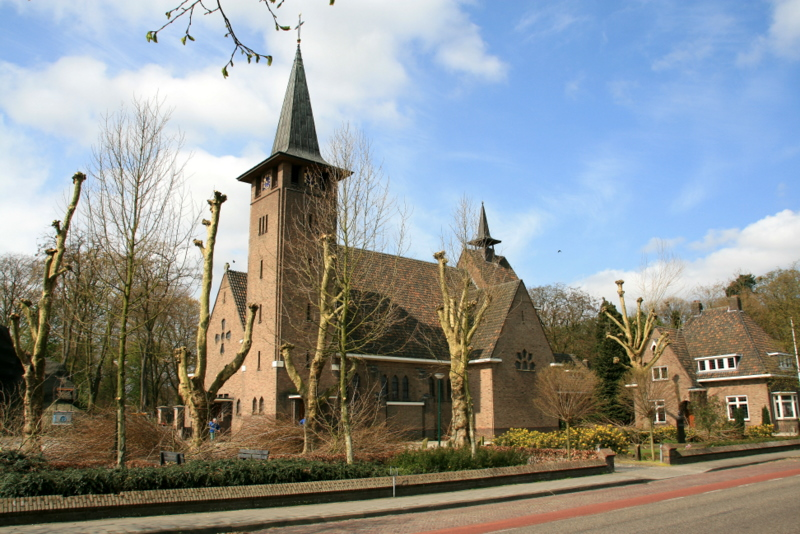 Mariahout - Mariastraat 25 - OLV van Lourdes kerk